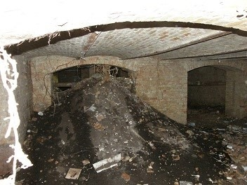 Schlosskeller Schloss Neustrelitz Keller